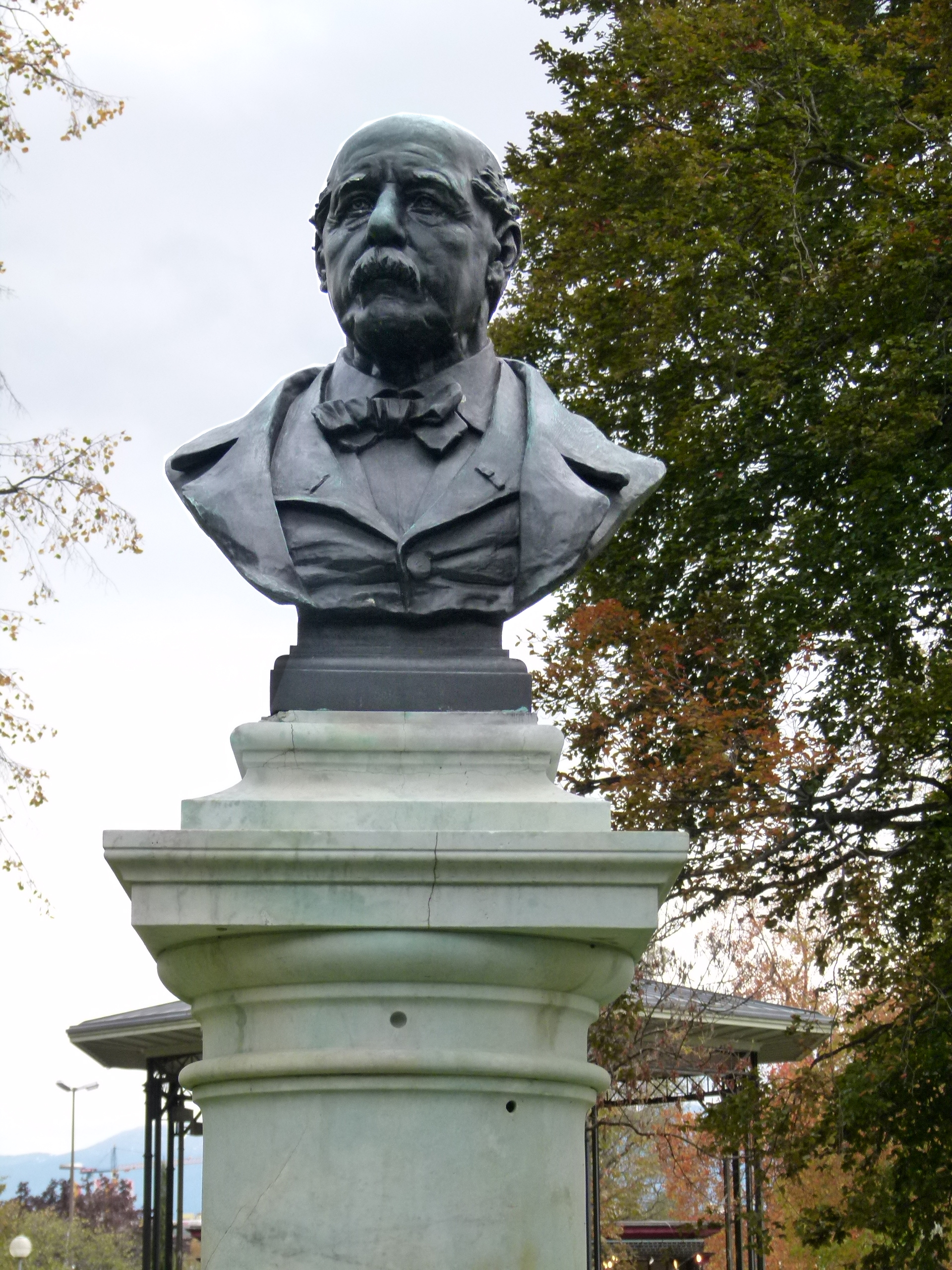 Büste von François Diday im Englischen Garten im Zentrum von Genf